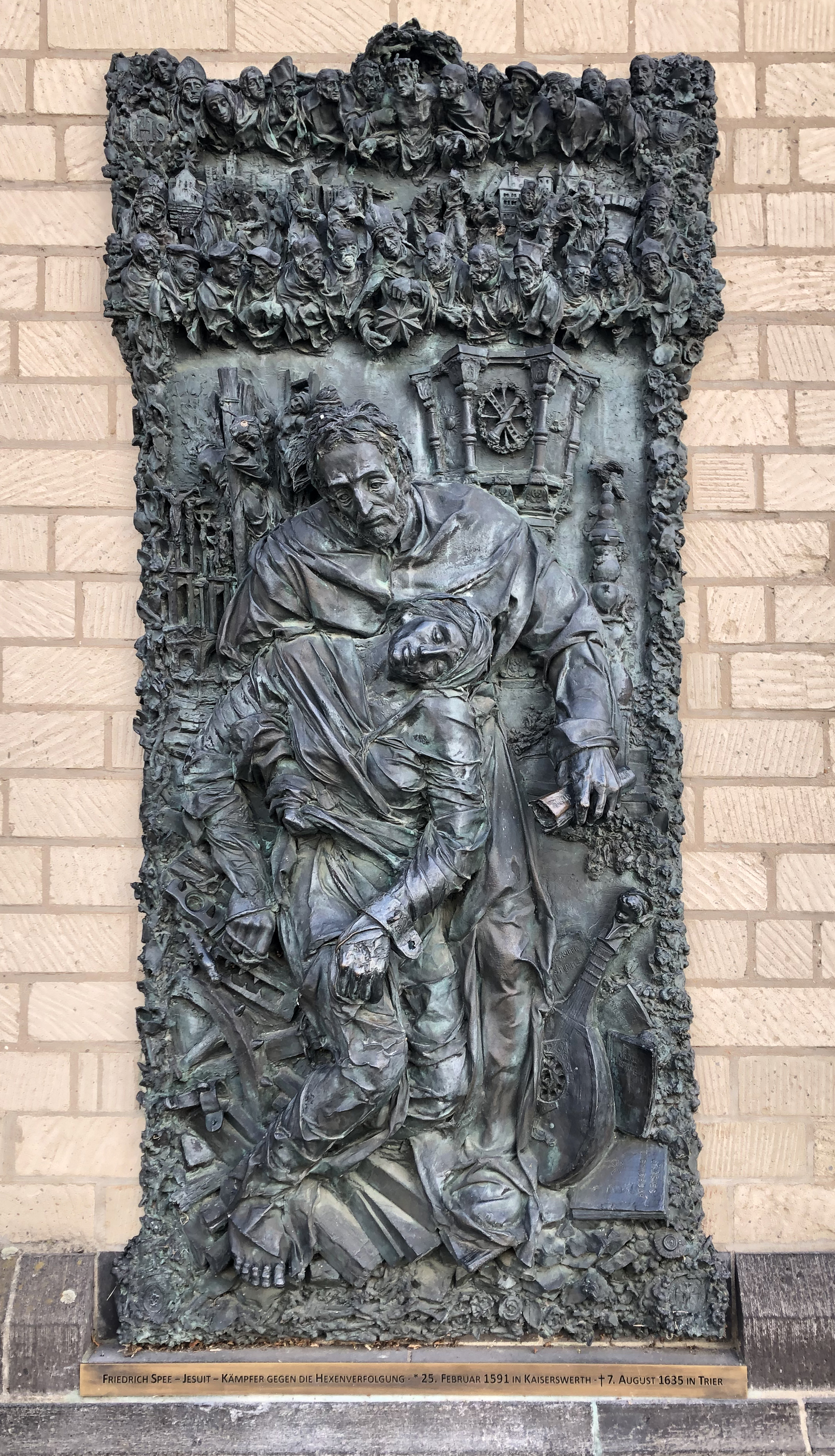 Bronzerelief von Bert Gerresheim, Stiftsplatz an St. Suitbertus Düsseldorf-Kaiserswerth, Epitaph für Friedrich Spee - Jesuit - Kämpfer gegen die Hexenverfolgung (* 25. Februar 1591 in Kaiserswerth; † 7. August 1635 in Trier)